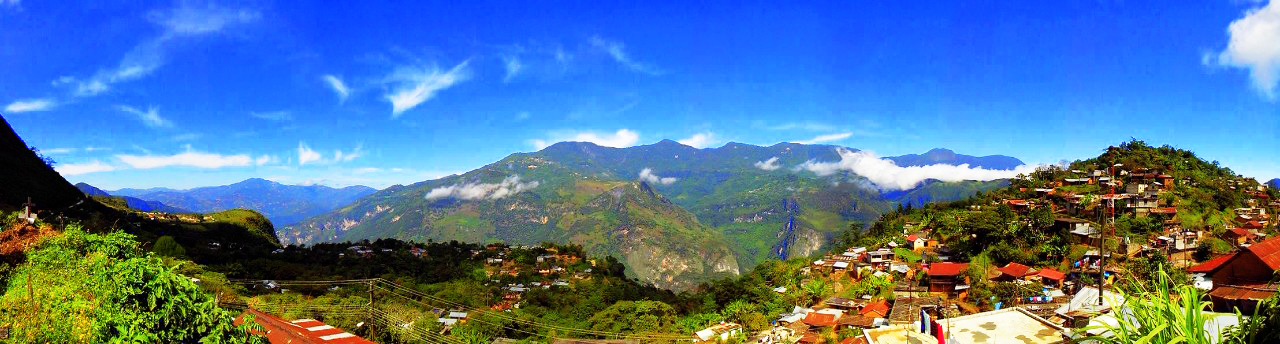 Panorámica Chiquihuitlán de Juárez